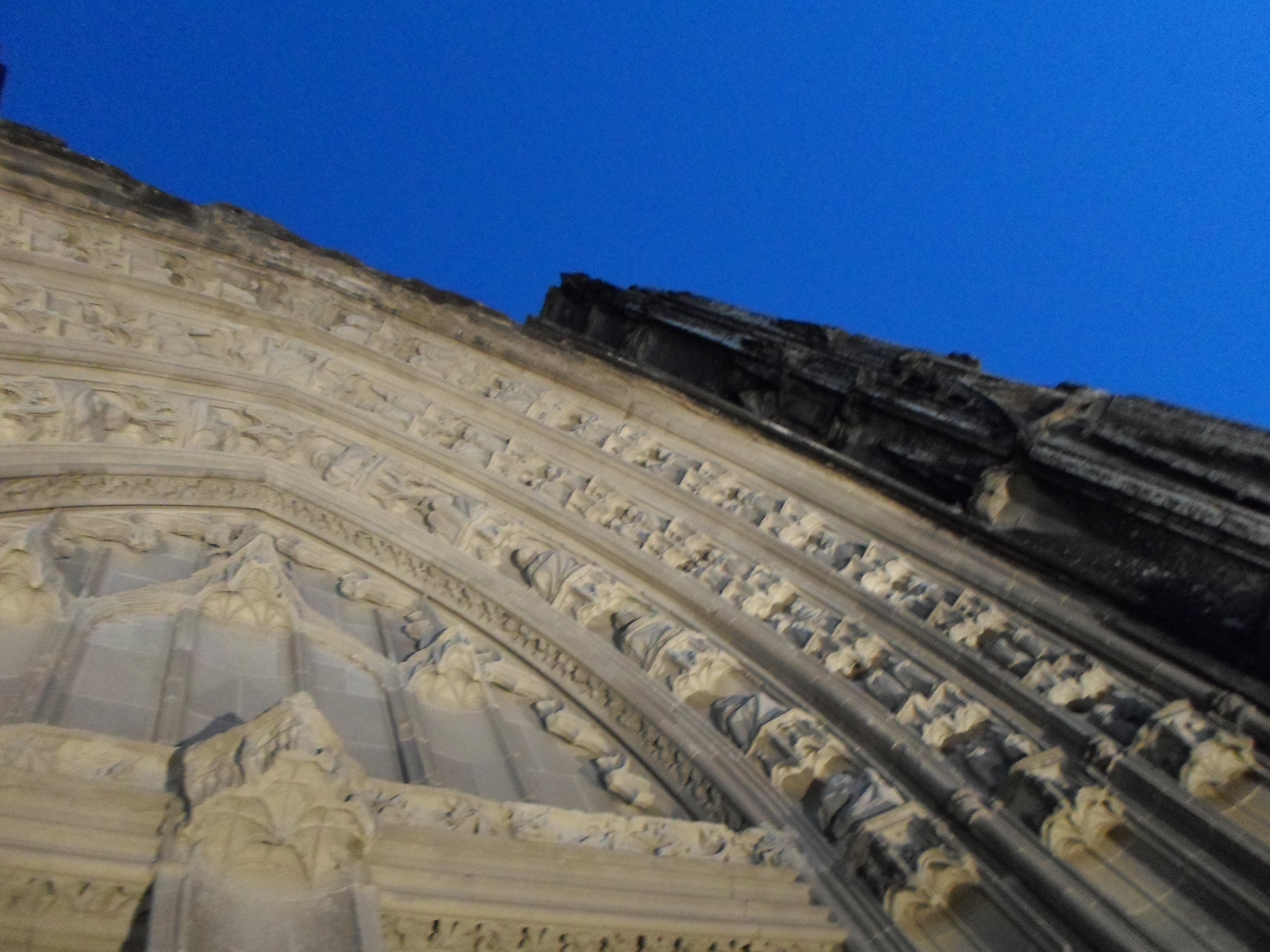 Église Notre-Dame de la Jayère Eglise Saint-Antoine-l'Abbaye by night 38160 PA38000020 VAN DEN HENDE ALAIN CC -BY-SA 4 0 050153 .